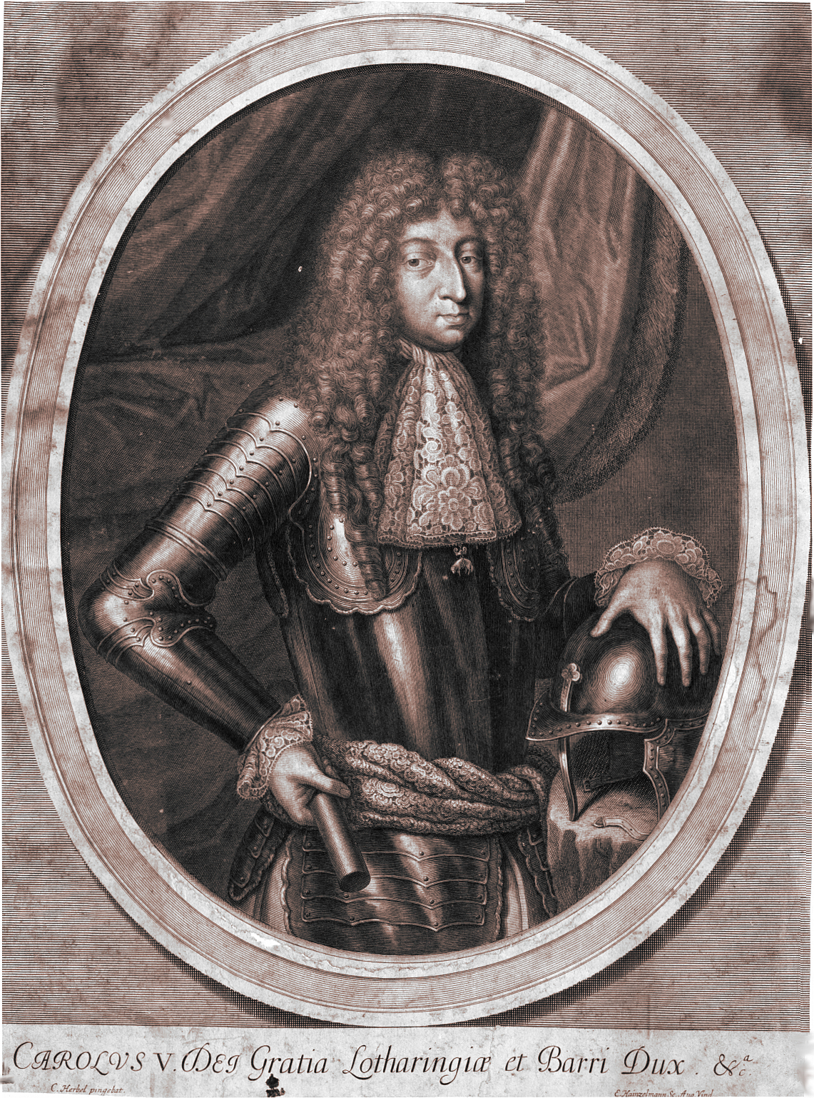 Karl V., Herzog von Lothringen (1643 - 1690) Porträt